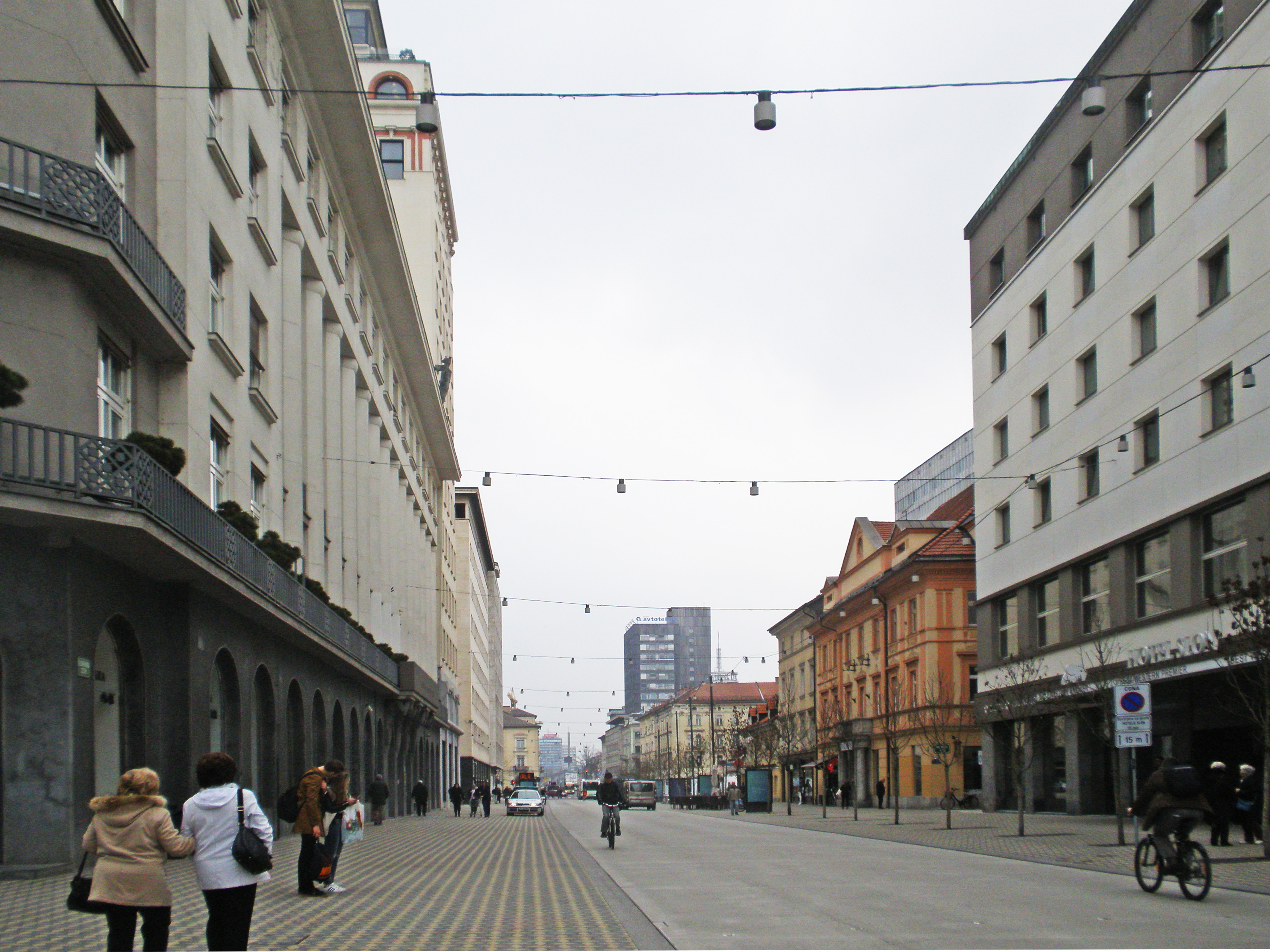 Free Morning in Ljubljana